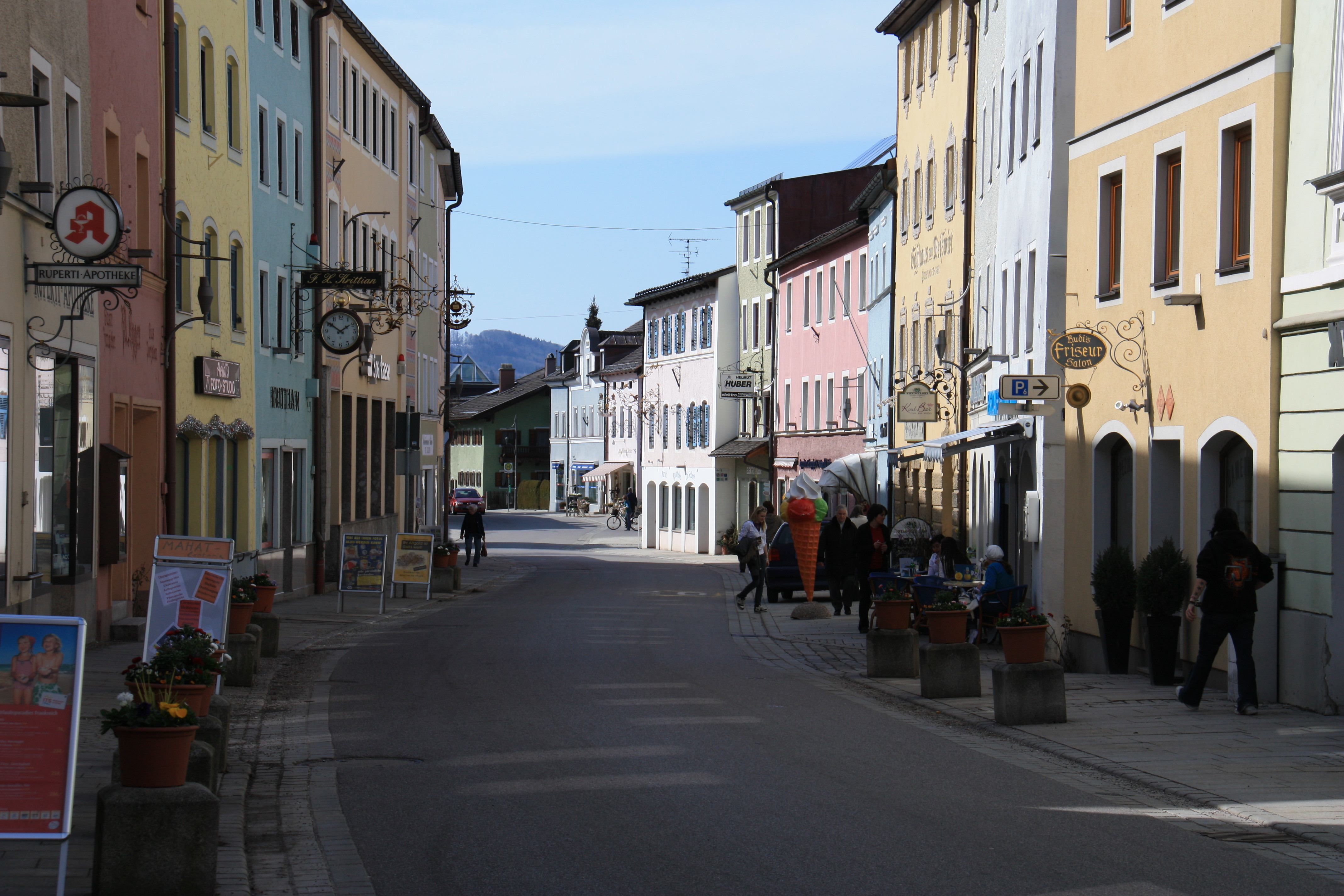 Die Teisendorfer Marktstraße (Fahrtrichtung Traunstein)